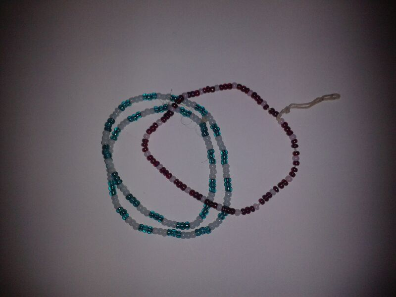 Són braçalets propis per a una entrada en Viquipèdia